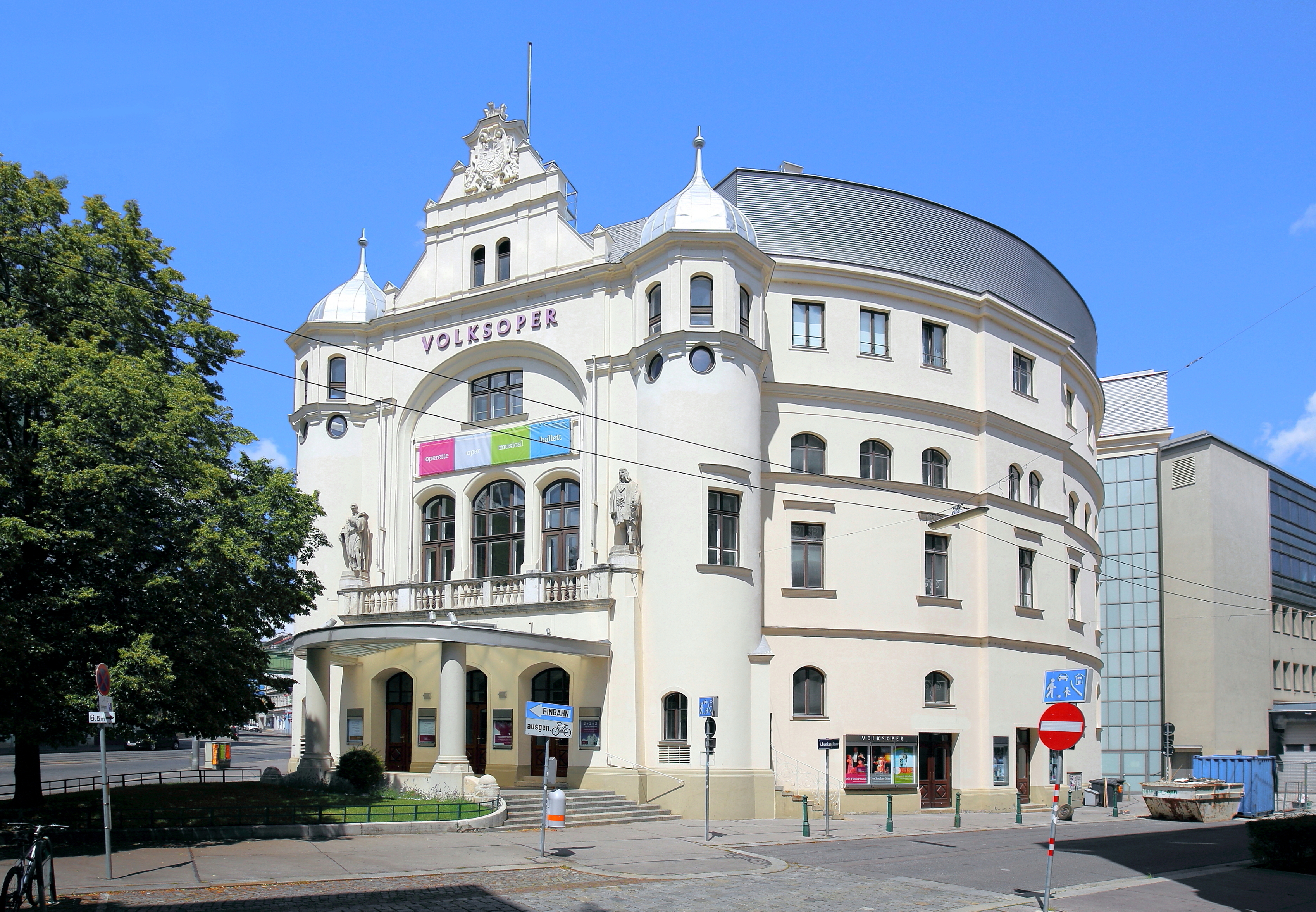 Die Volksoper in der österreichischen Bundeshauptstadt Wien. Anlässlich des 50-jährigen Regierungsjubiläums von Kaiser Franz Joseph I. wurde sie unter dem Namen "Kaiser-Jubiläums-Stadttheater" durch die Architekten Franz Freiherr von Krauss und Alexander Graf errichtet und am 14. Dezember 1898 als Sprechbühne eröffnet. Ab 1908 firmierte das Theater nur mehr unter dem Namen "Volksoper".